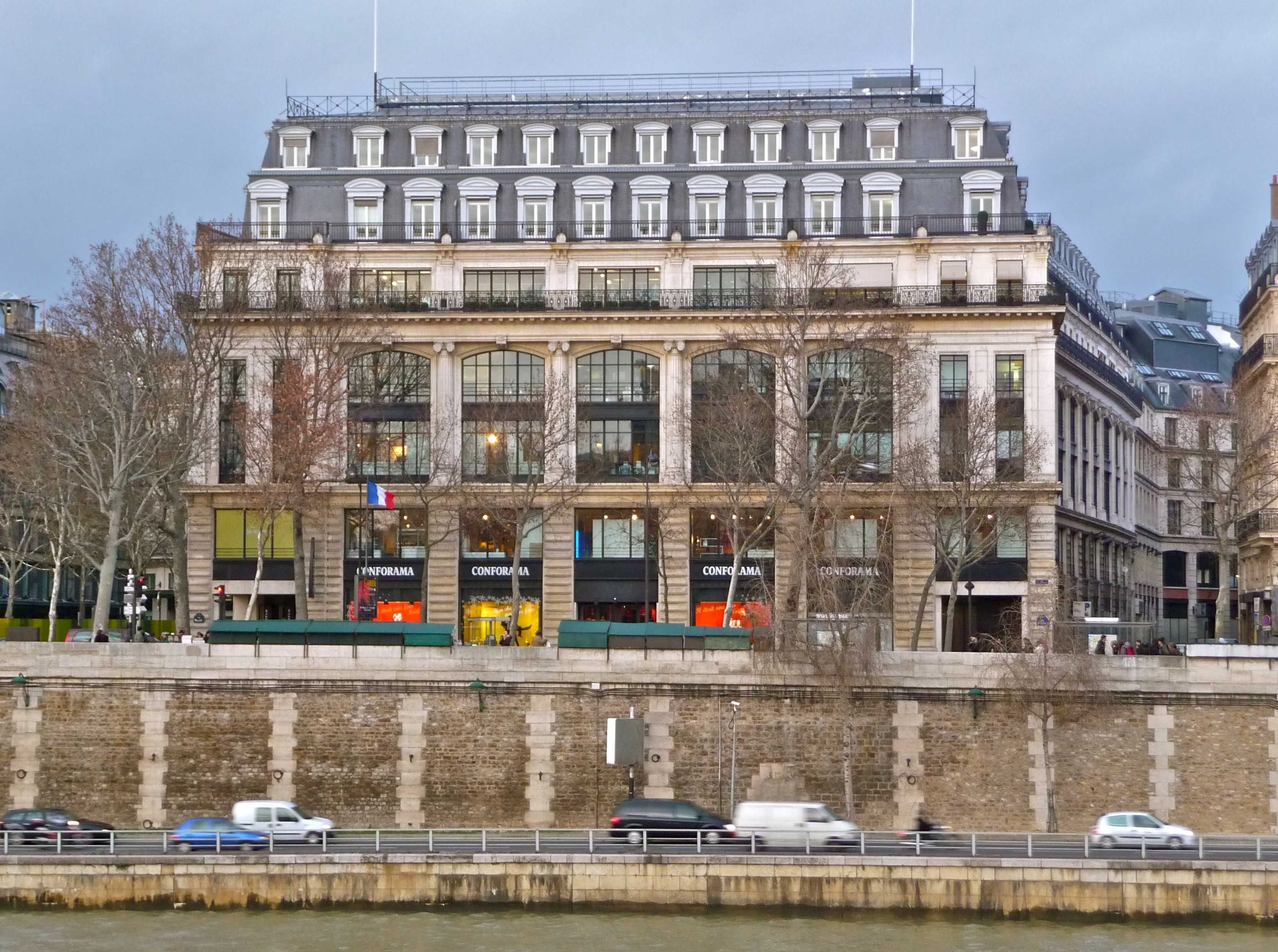 22 Quai de la Mégisserie, 75001 Paris, France.